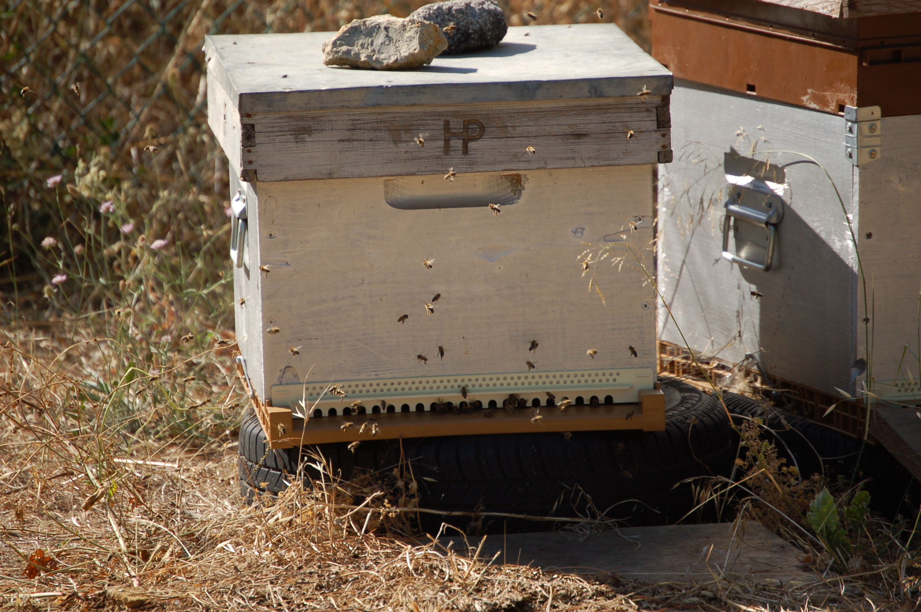 Ruche artificielle dans les alentours de Toulon (Var)